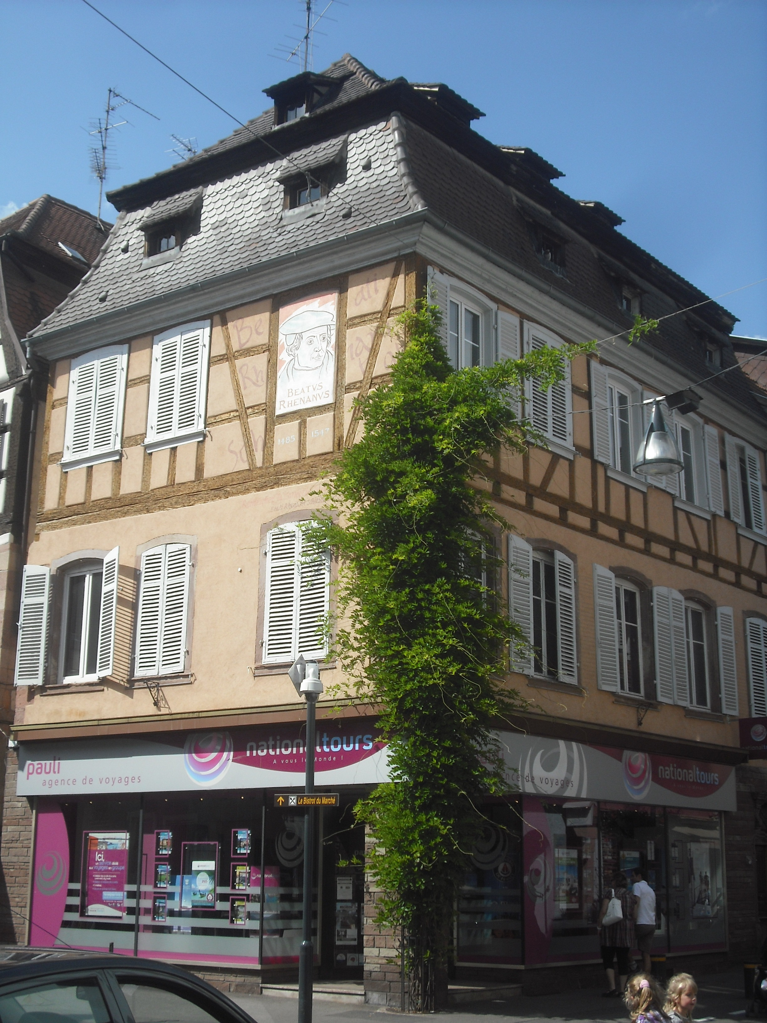 Maison XVIIIe, rue des Chevaliers, Sélestat, Bas-Rhin, France.